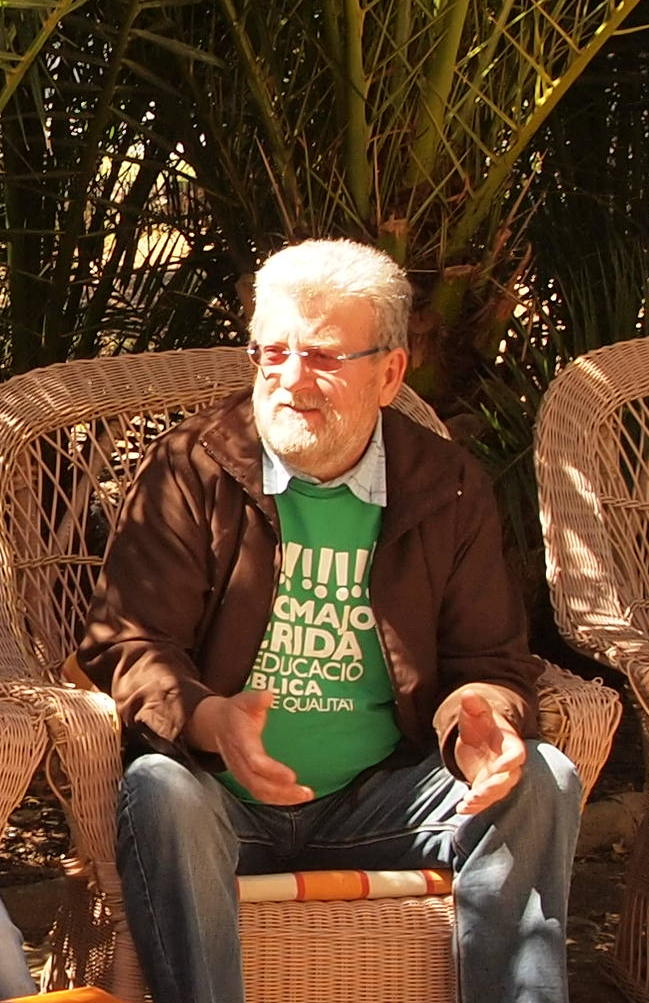 Jaume Sastre i Font durant la seva vaga de fam a Sa Casa Llarga en defensa d'una educació pública de qualitat en català.